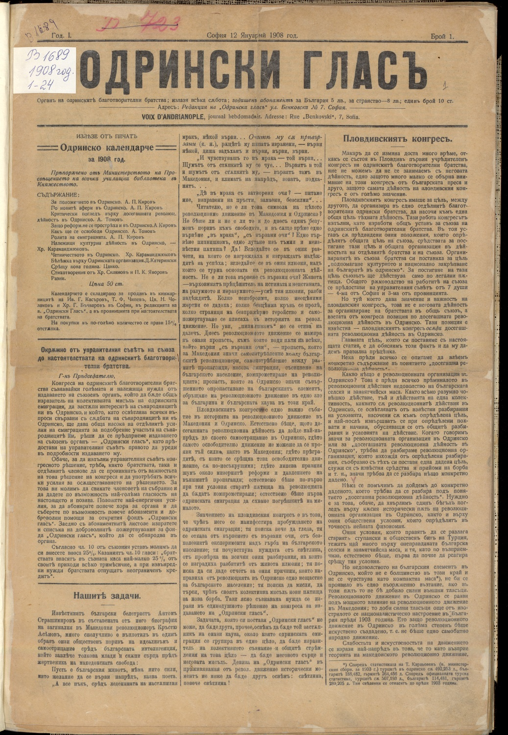 Брой №1 на "Одрински глас"